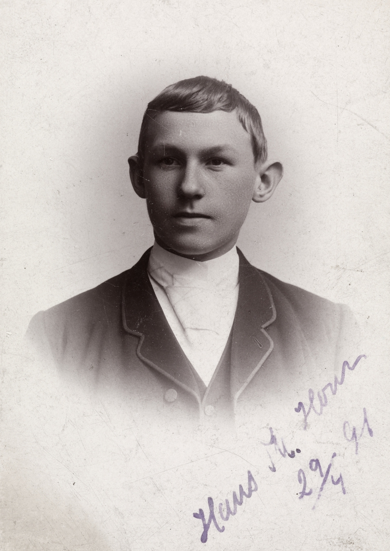 Hans Thomas Horn. Foto: Christian Gihbsson, 1891. Fra Byhistorisk samling hos Oslo Museum.